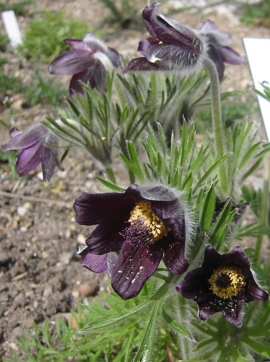 Pulsatilla_pratensis_subsp_nigricans